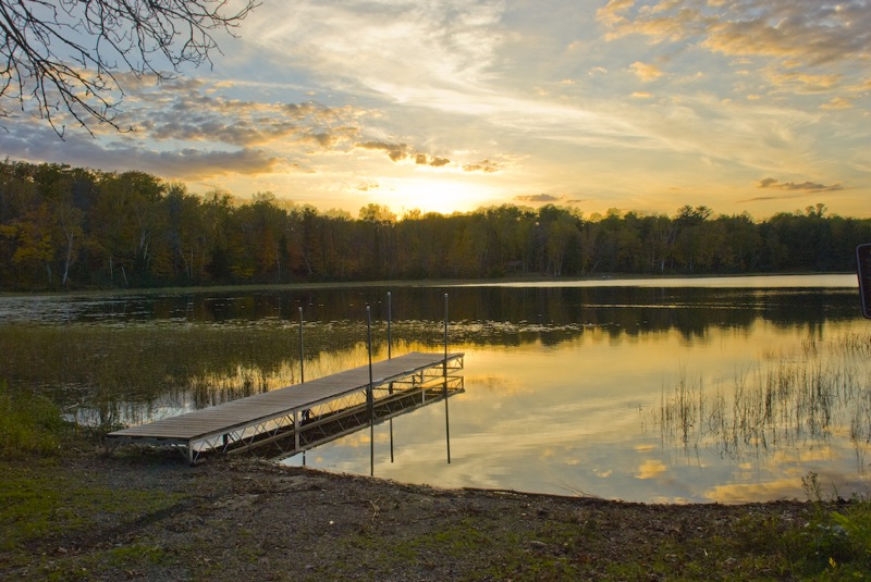 Savanna Portage State Park, McGregor Minnesota